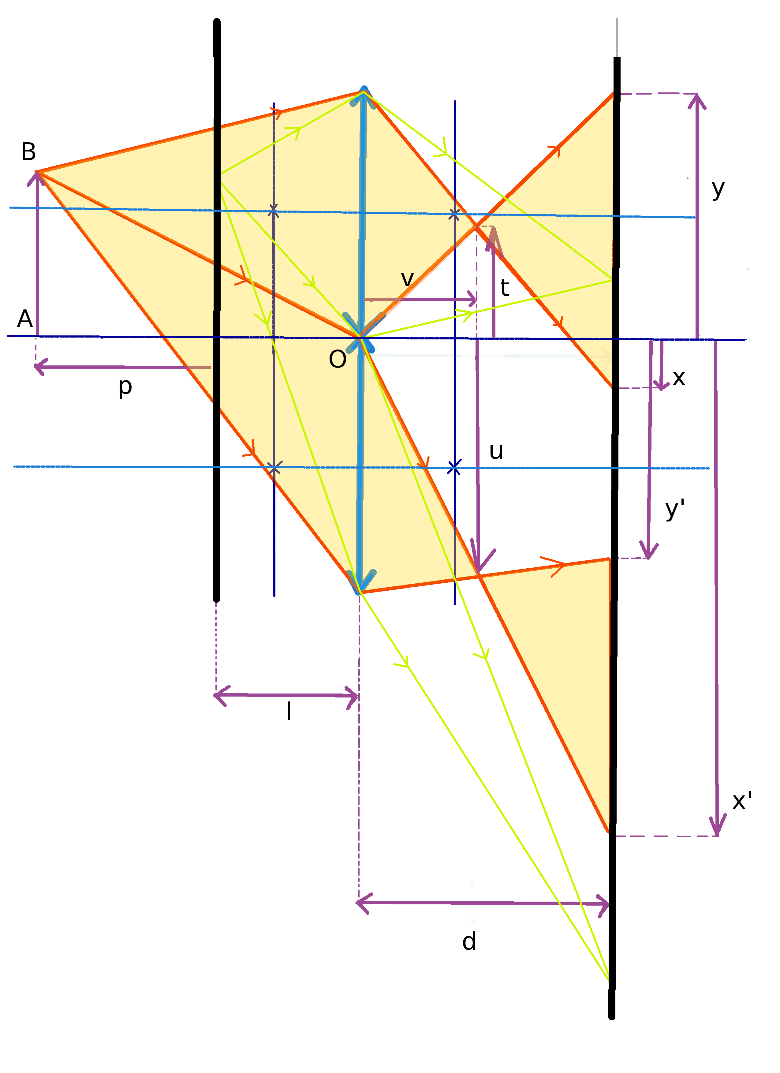 L'objectif donne de la source ponctuelle une image avant le capteur principal ou film. Ainsi les lentilles du couple télémétrique vont donner de cette image une autre se formant avant les capteurs CCD.